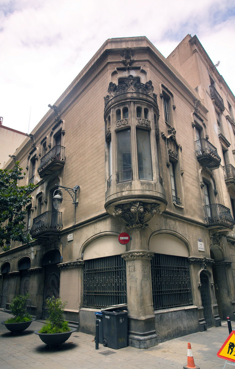 Casa Agustin Valentí obra de 1906 d'Antoni Millas i Figuerola. Barcelona(Catalunya)